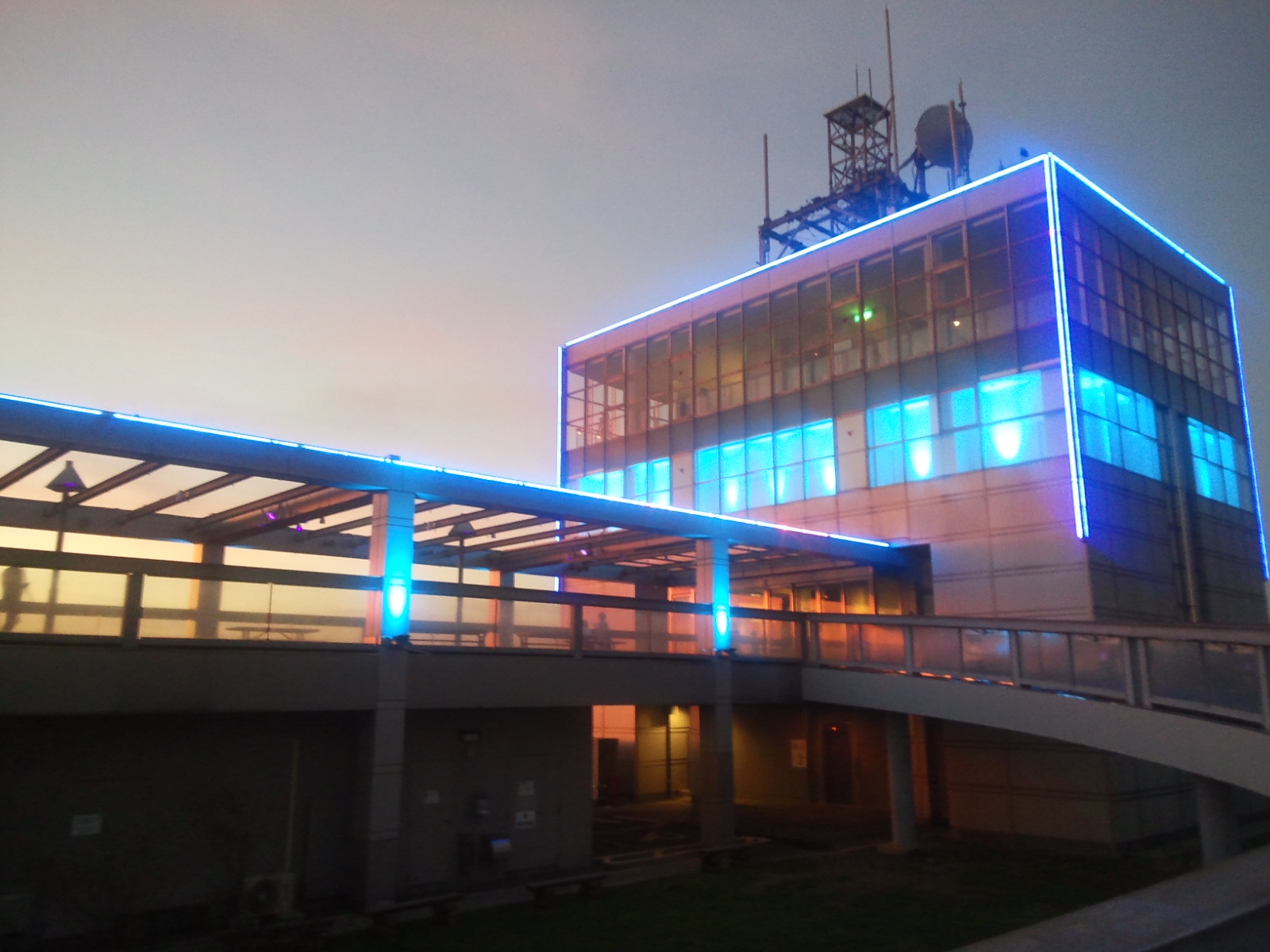 蔵王山展望台『光のアート』